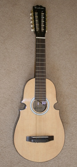 a Puerto Rican cuatro